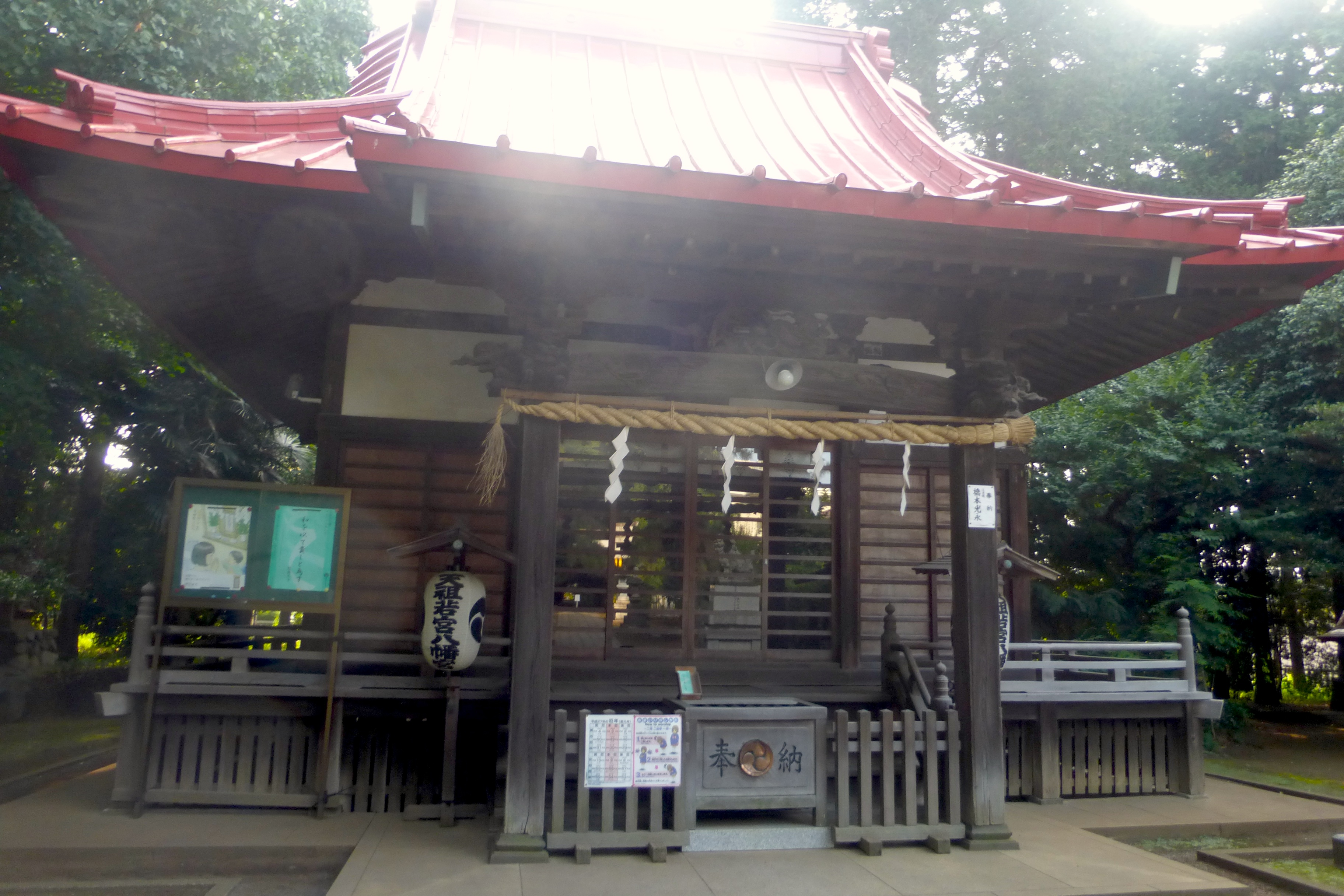 天祖若宮八幡宮（てんそわかみやはちまんぐう）は東京都練馬区関町北三丁目にある、神社である。